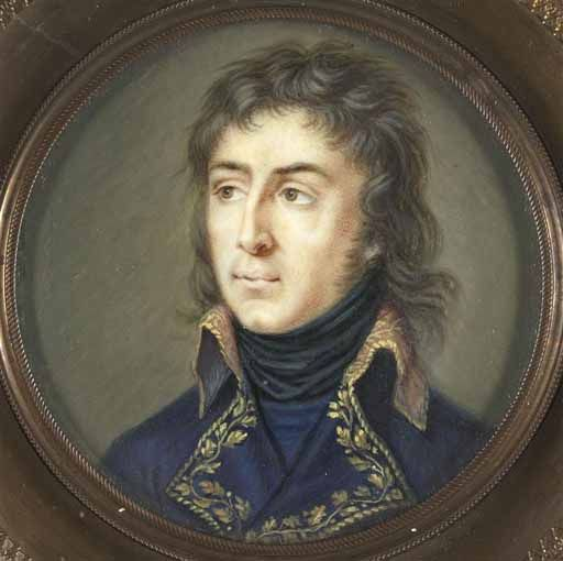 Portrait de Louis-Charles-Antoine Desaix - Peinture